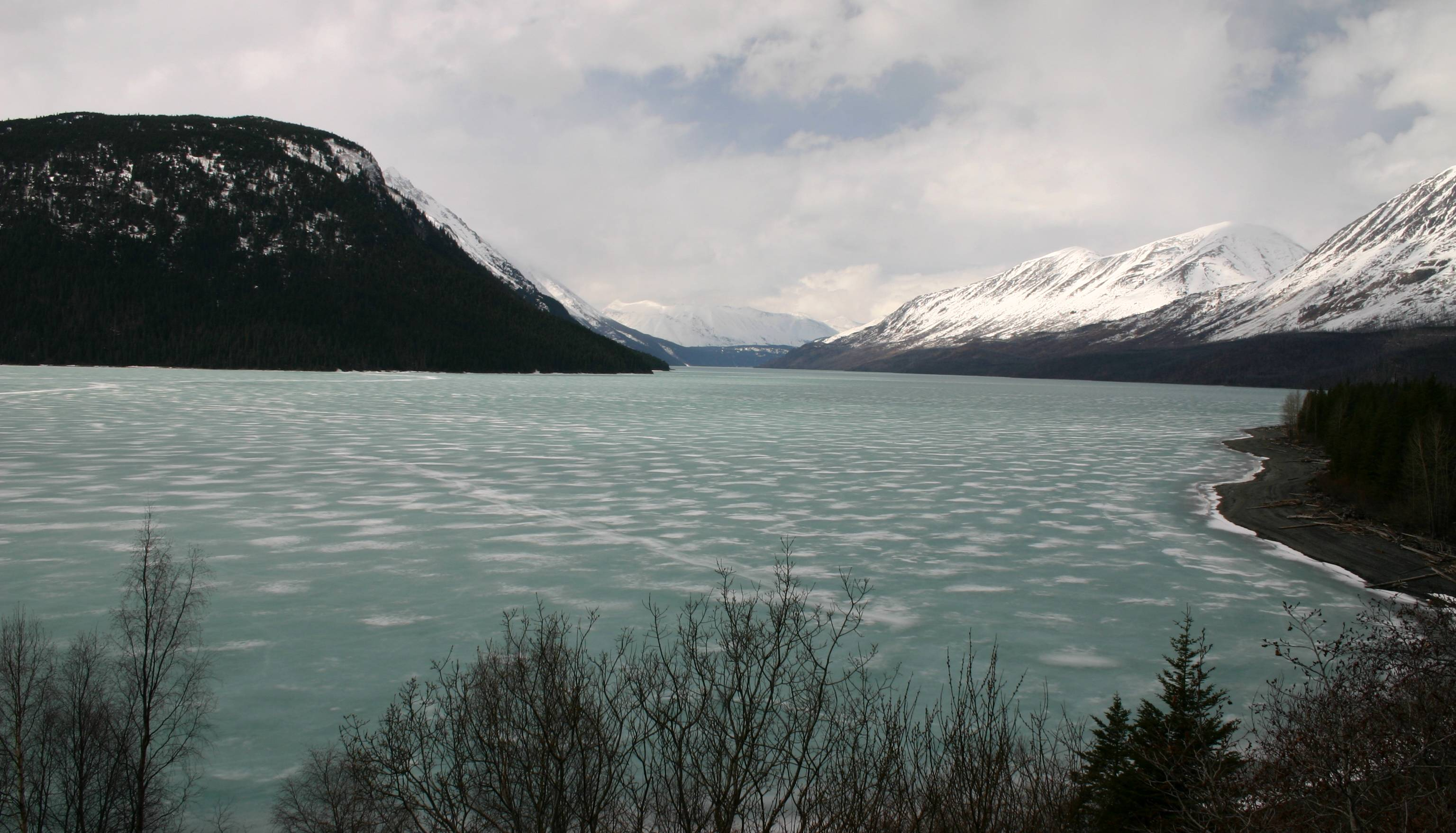 Taken while visiting Seward, Alaska in April 2008.